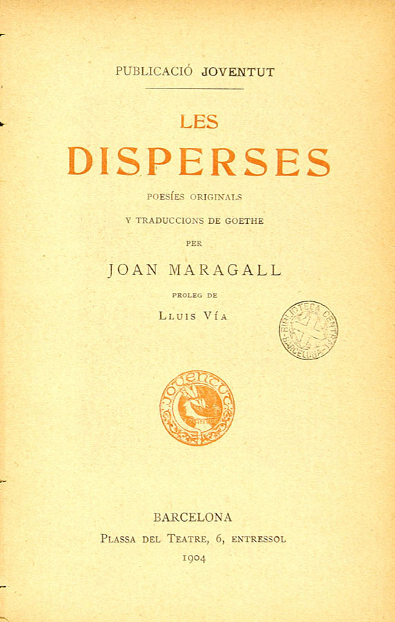 MARAGALL, Joan: les Disperses. Poesies. Tip. "Joventut", Barcelona, 1904. És una antologia d'obra pròpia i traduccions de Goethe produïdes al llarg de la vida de l'autor